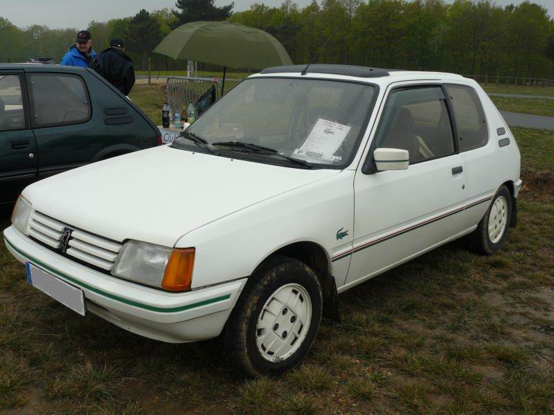 Photo prise à Montlhery avril 2012